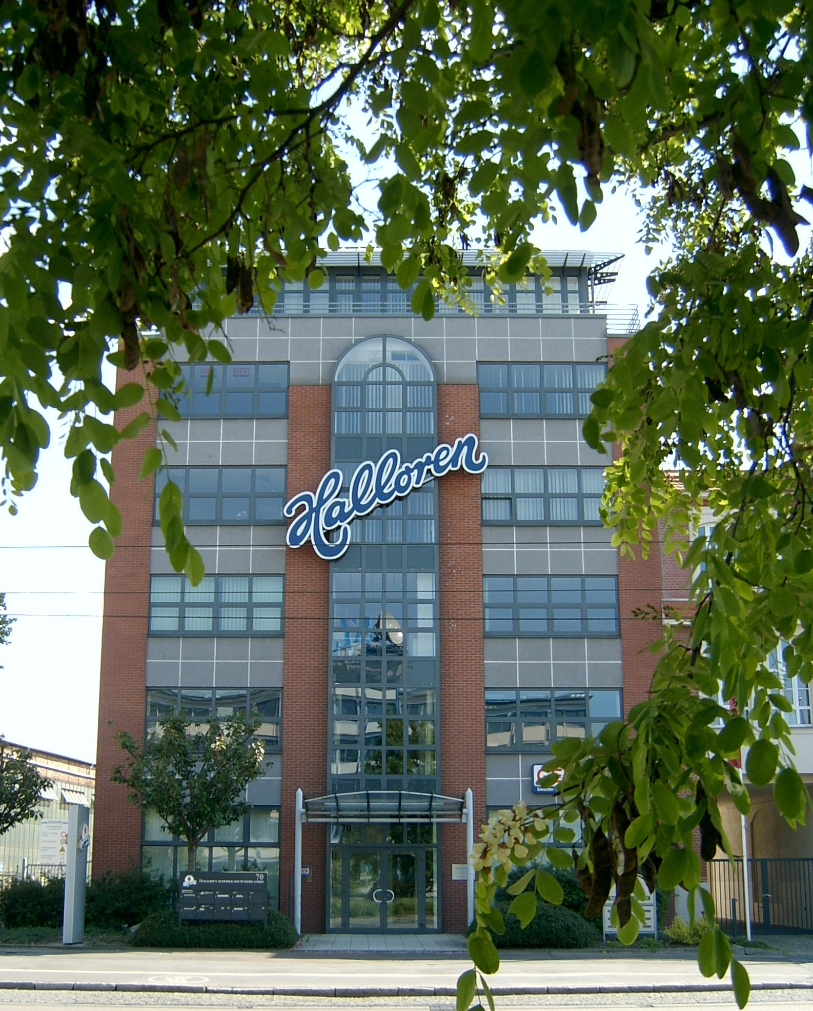 Das Gebäude der Halloren Schokoladenfabrik in Halle (Saale) - Haupteingang